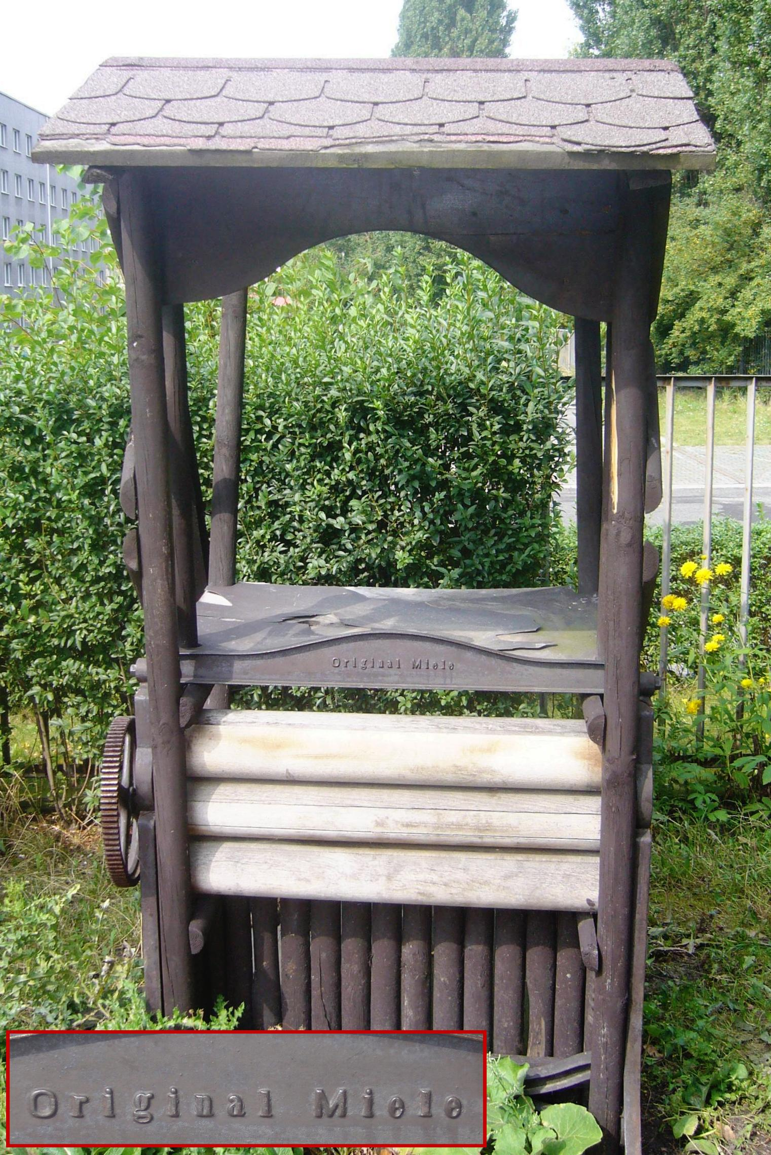 Alte Wäschepresse von Miele